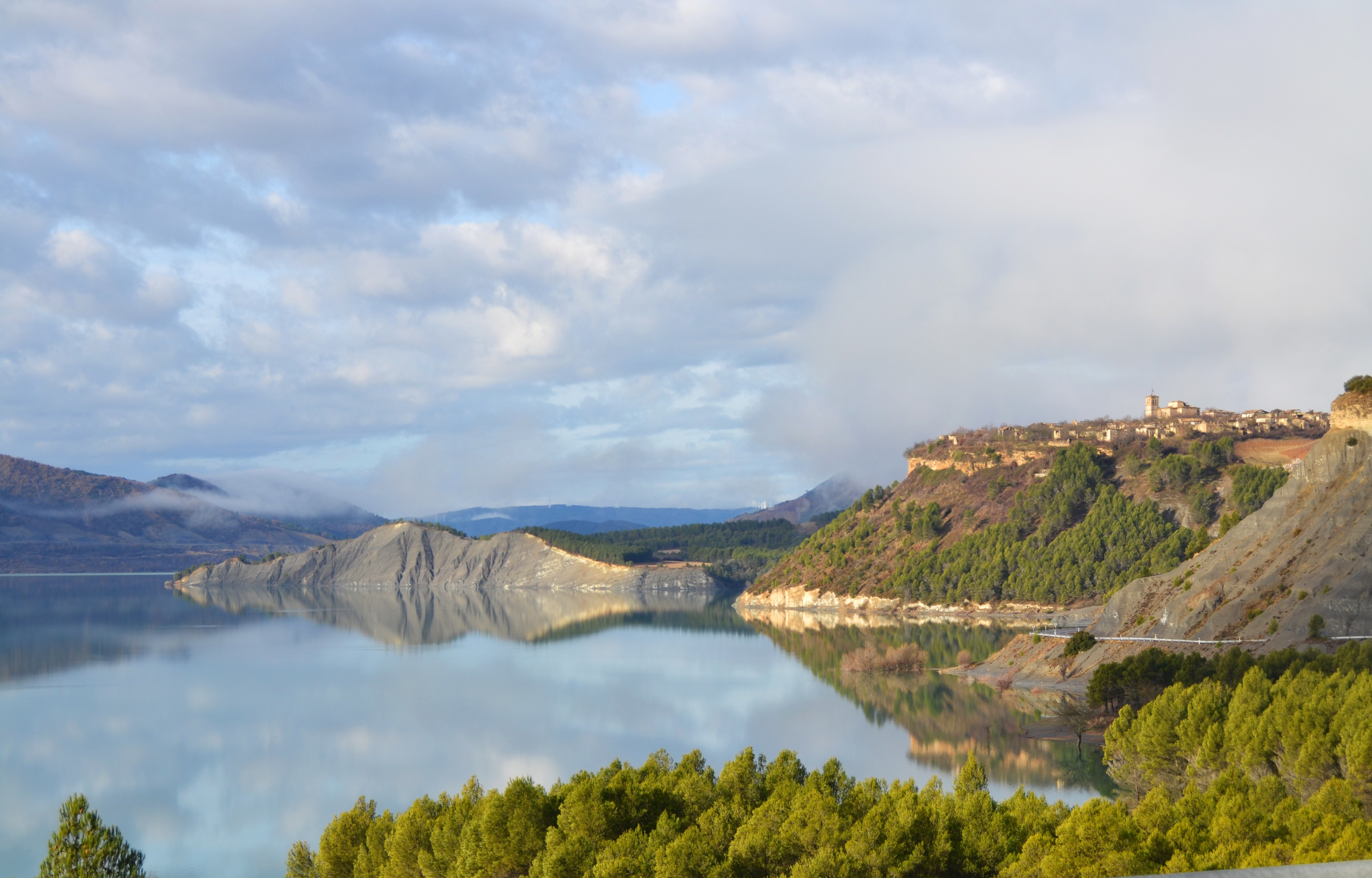 Vista de l'embassament de Yesa.